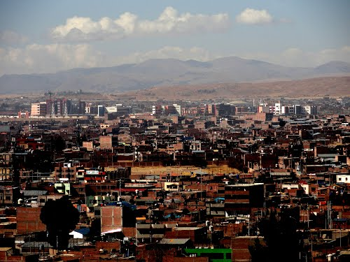 univercidad andina Nestor Caceres Velasquez